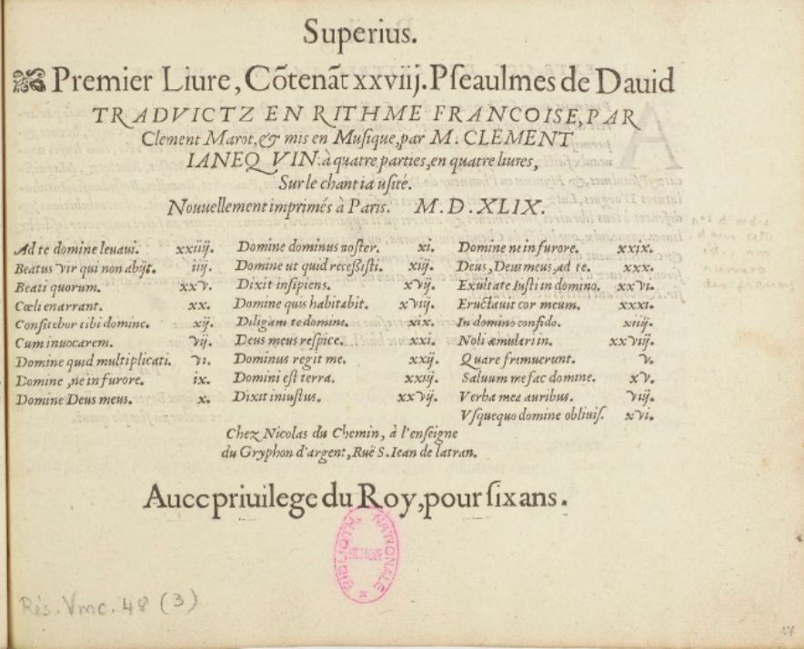 Title page of Janequin’s